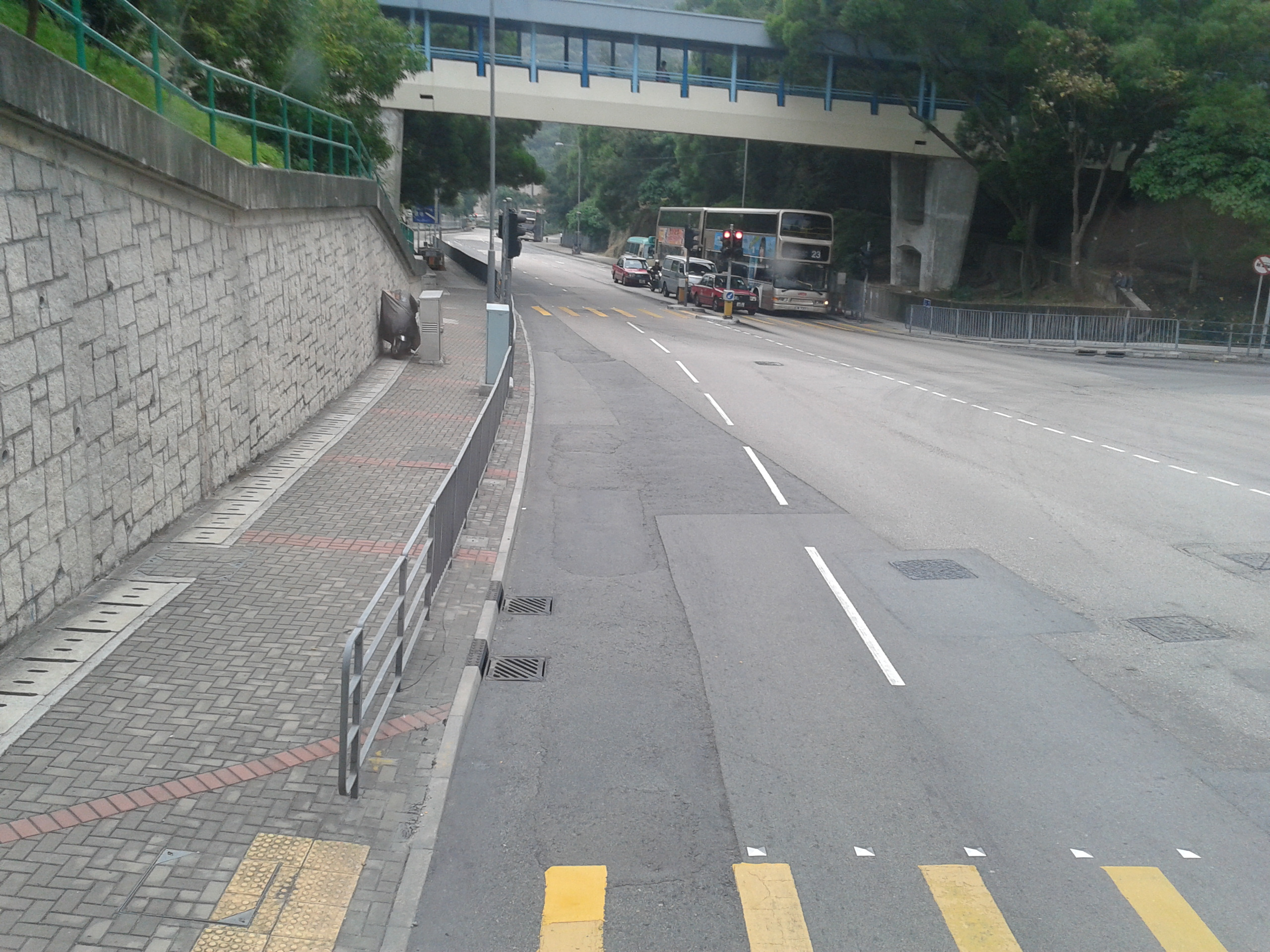 中文（香港）: 秀茂坪道與順安道交界